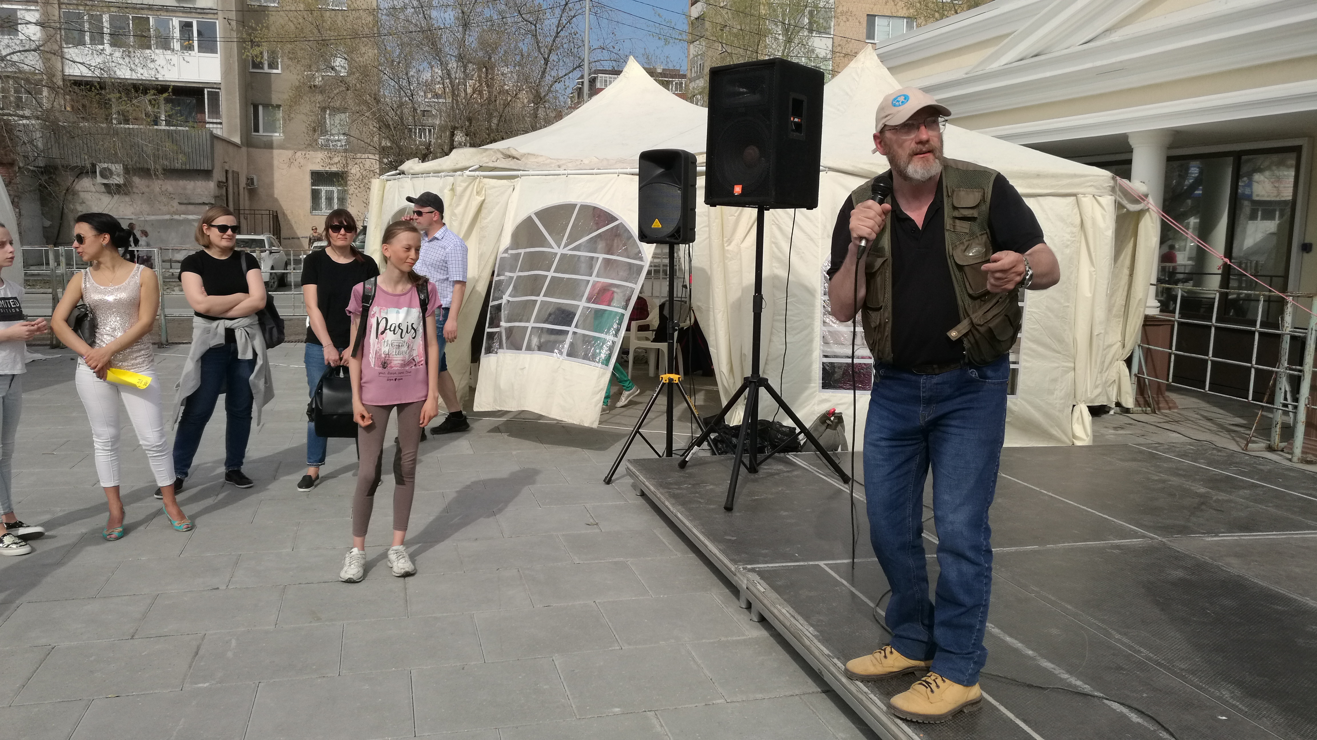 Biologo Pavel Sitnikov gvidas kvizon dum la festivalo "Varmego" sur la placo de la 400-jariĝo de Tjumeno. Tjumeno, Rusio.